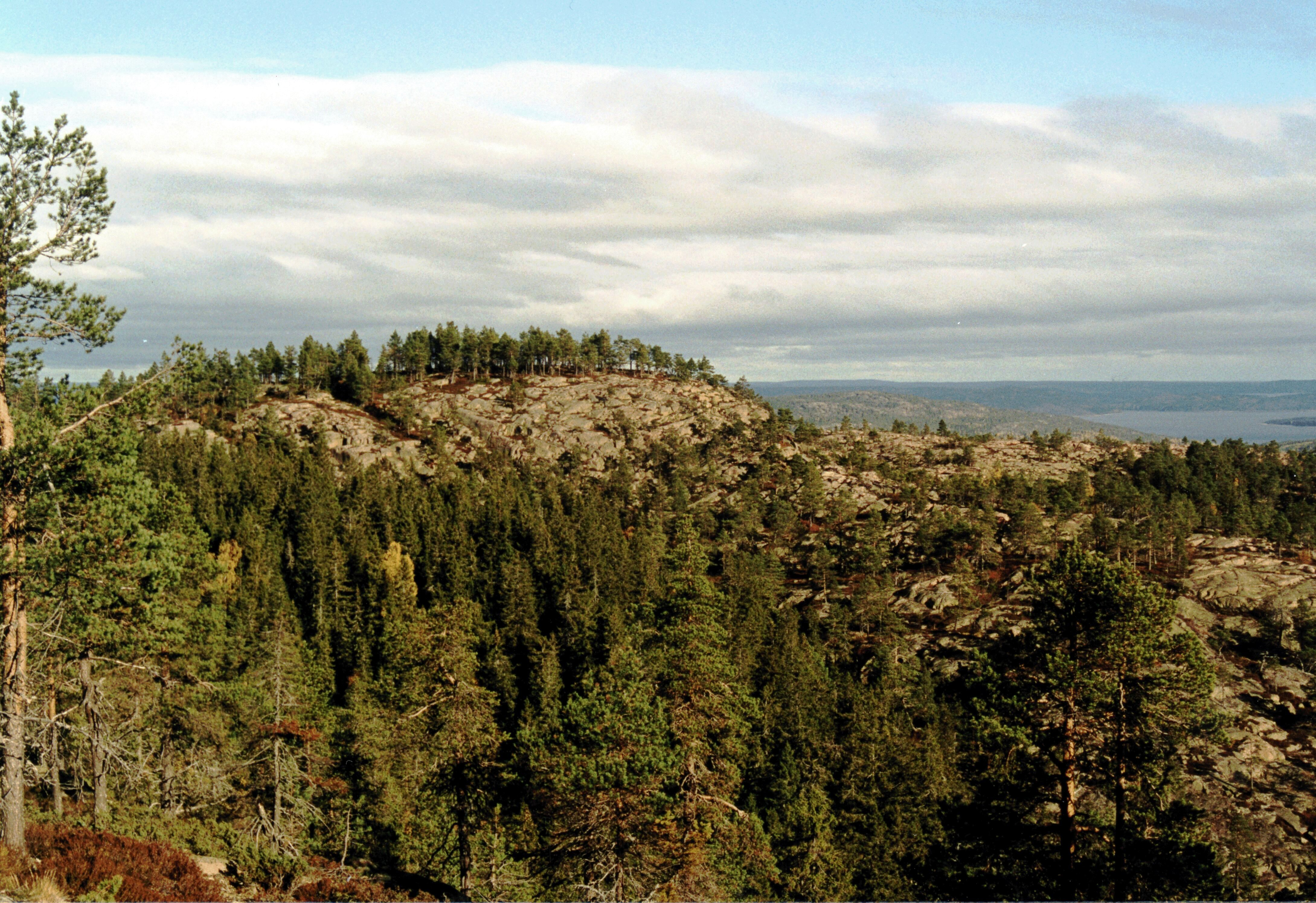 Kalottberg 400 m northwest of Slåttdalsberget, Skuleskogen national park. Curt Fredén, SGU